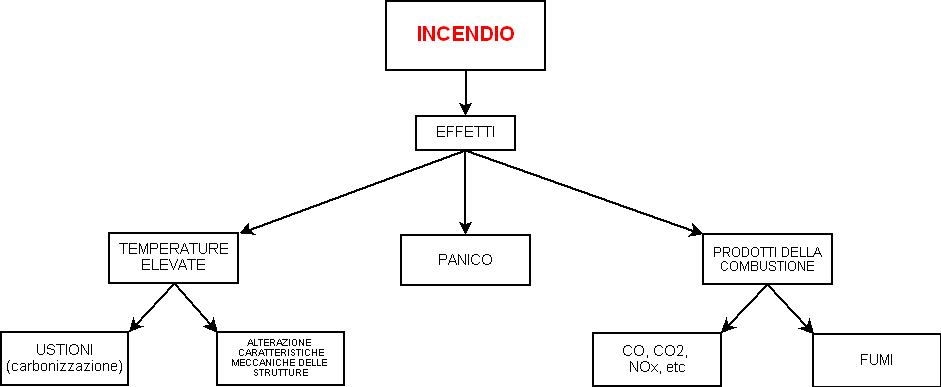 Effetti di un incendio